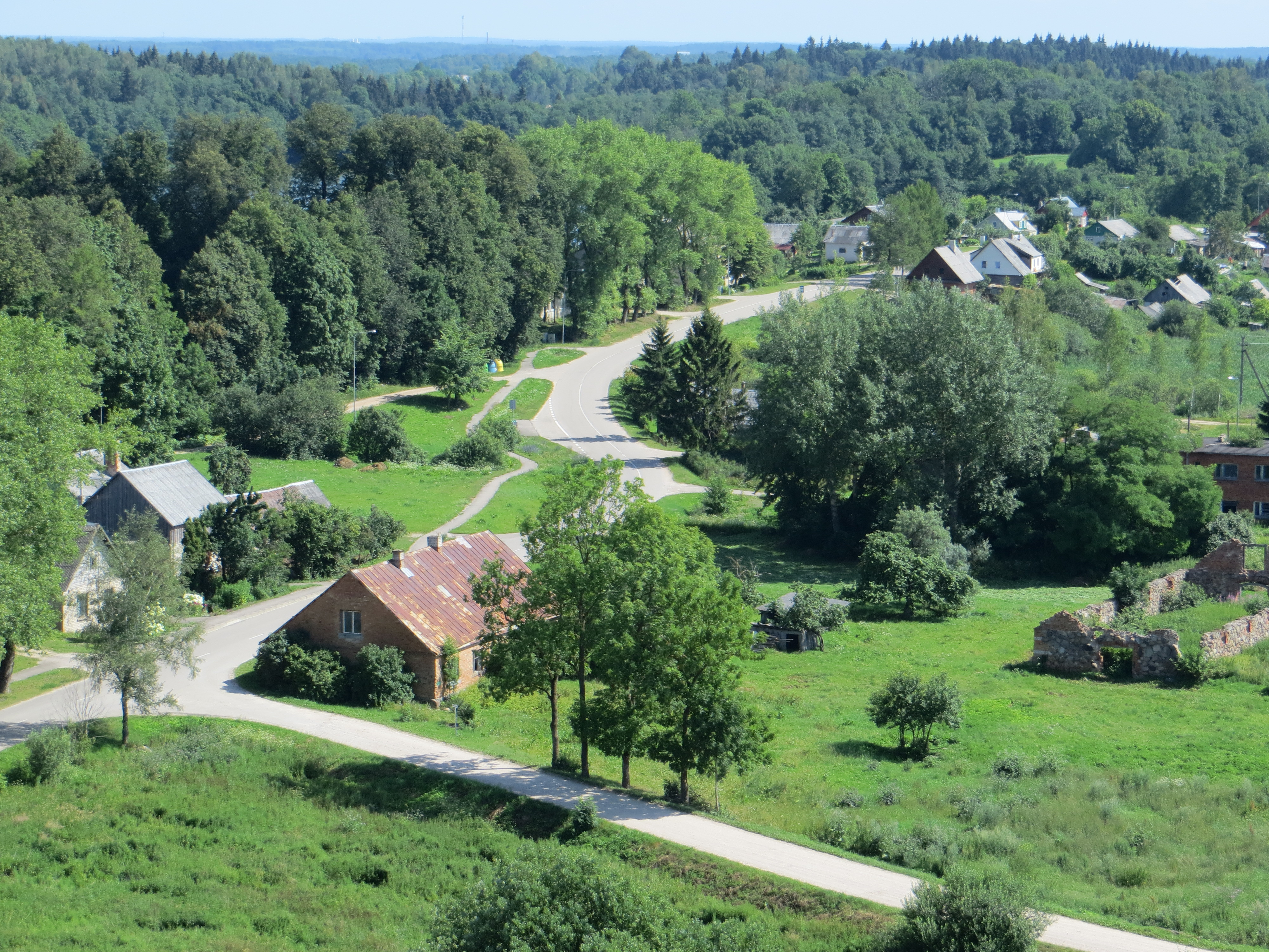 Ambraziškiai, Lithuania